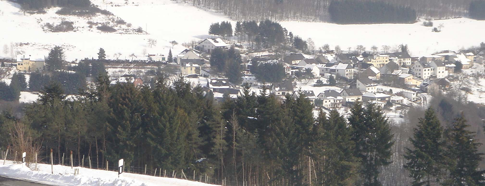 Die Gemeinde Hinzenburg im Winter 2005